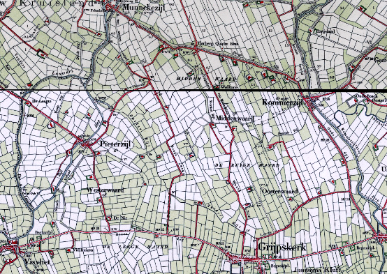 Vereeniging